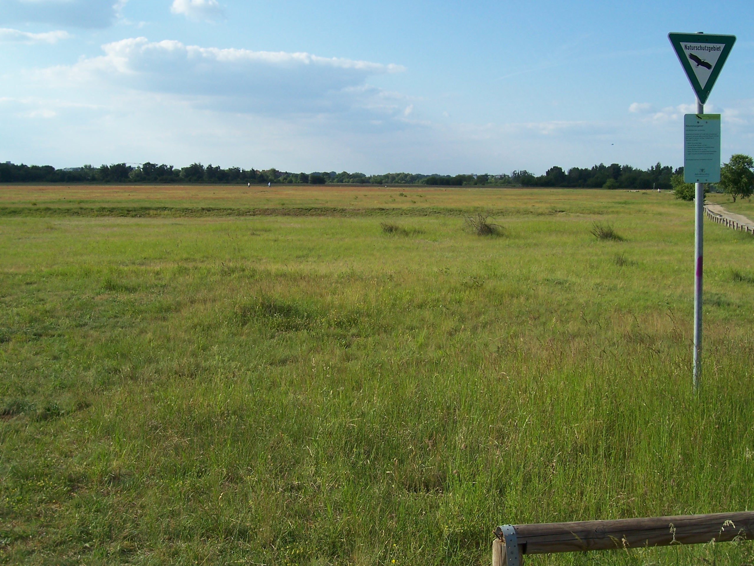 Naturschutzgebiet Alter Flugplatz Karlsruhe, Baden-Württemberg, Schutzgebiets-Nr. 2.229